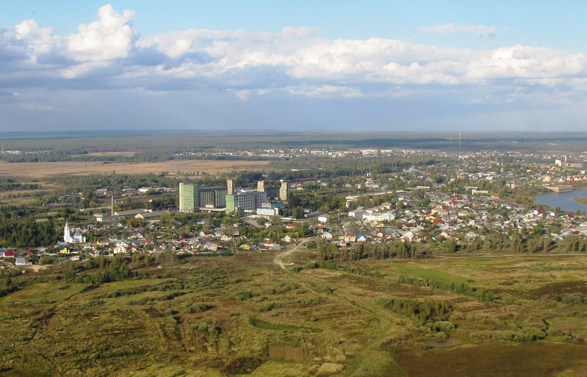 Районный центр Володарск (Нижегородская обл).